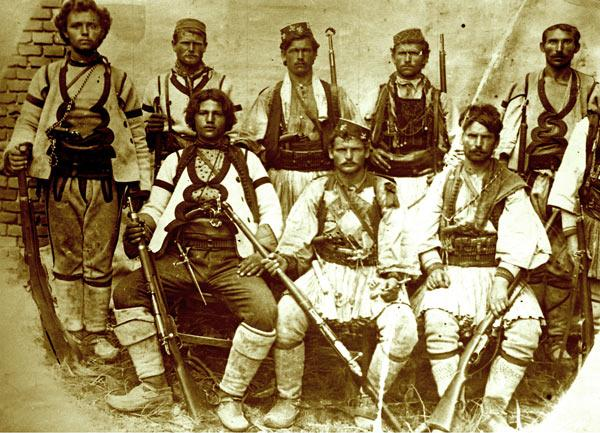 Четата на Трейко Зойката.